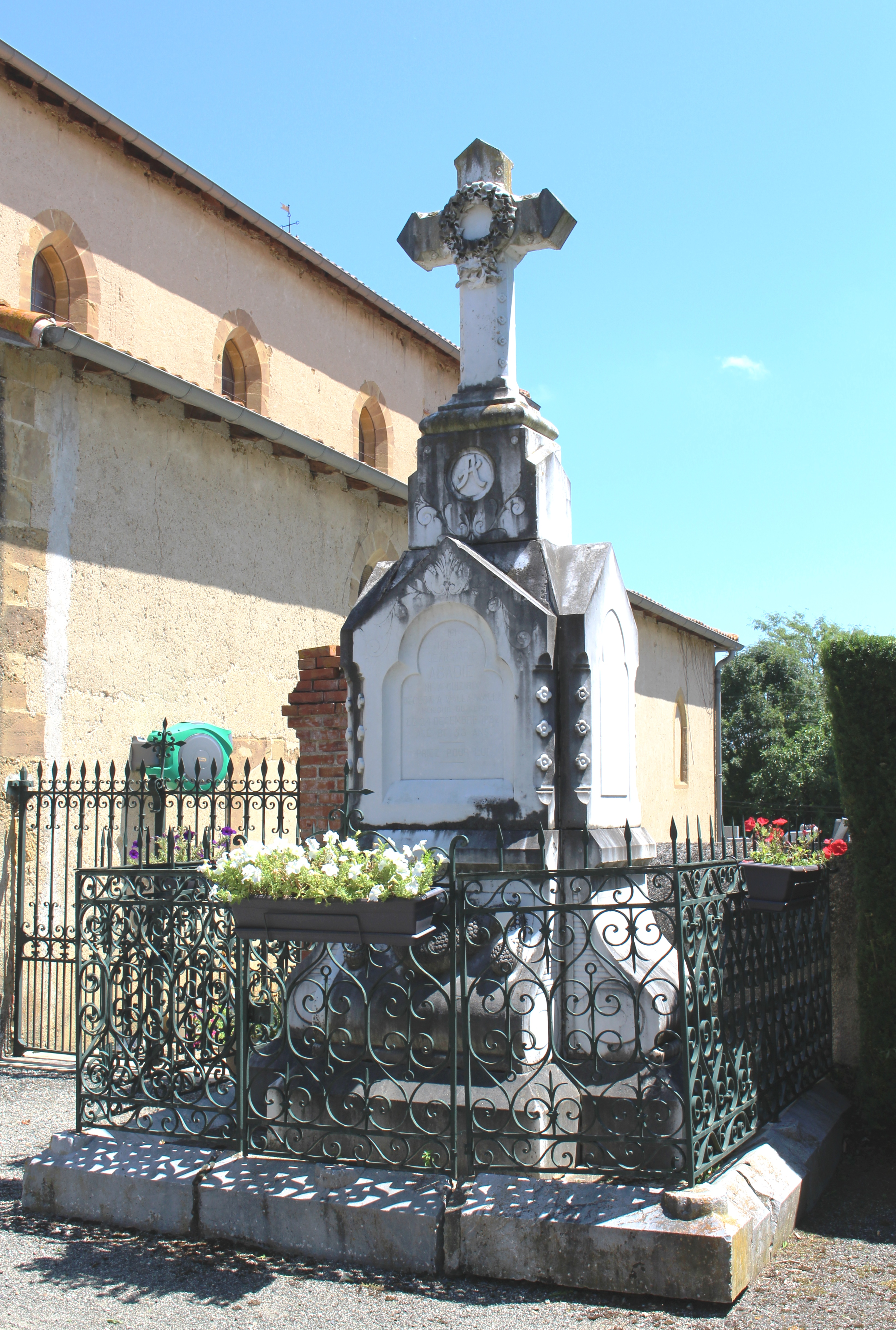 Croix de Guizerix (Hautes-Pyrénées)